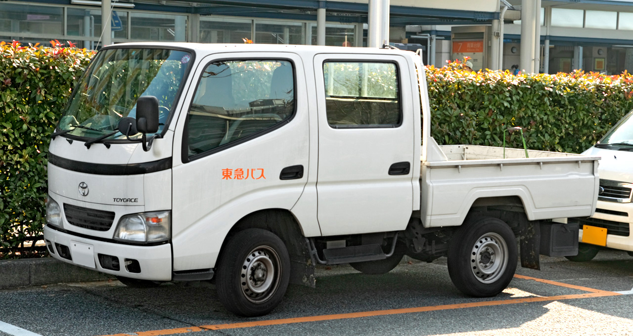 Toyota Toyoace